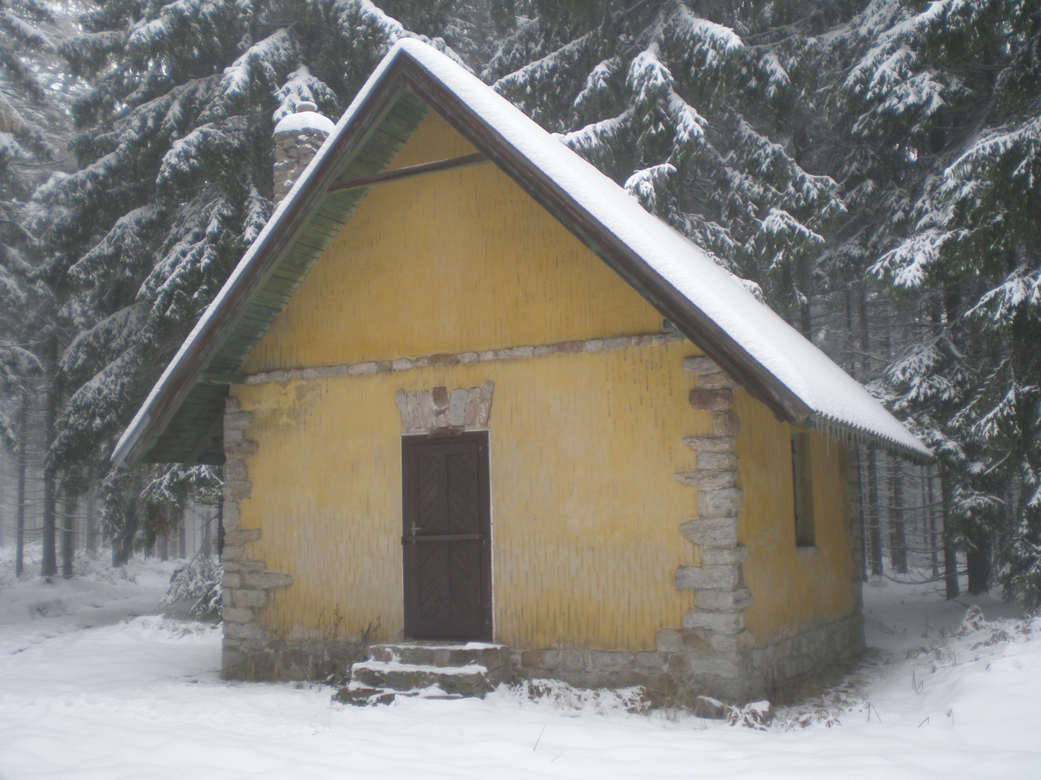 Bouda "U břízy" nedaleko Hradiště (840 m)